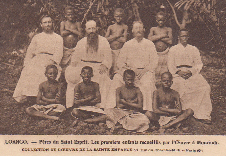 Loango - Pères du Saint Esprit - Les premiers enfants recueillis per l'Oeuvre à Mourindi - Collection de l'Oeuvre de la Sainte Enfance - 44 rue du Cherche-Midi -Paris (6e)